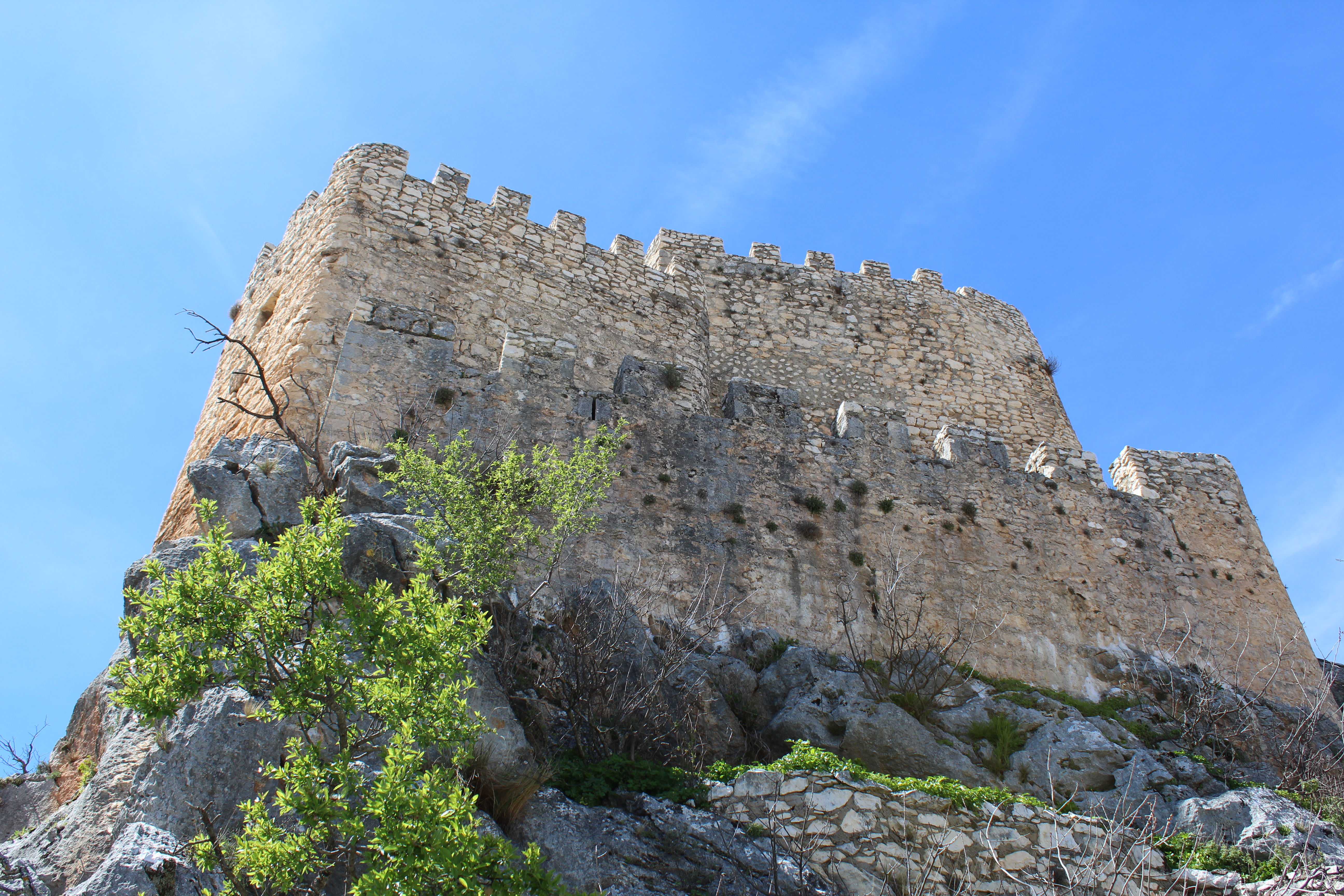 Vista general del alcazarejo de Albanchez de Mágina.